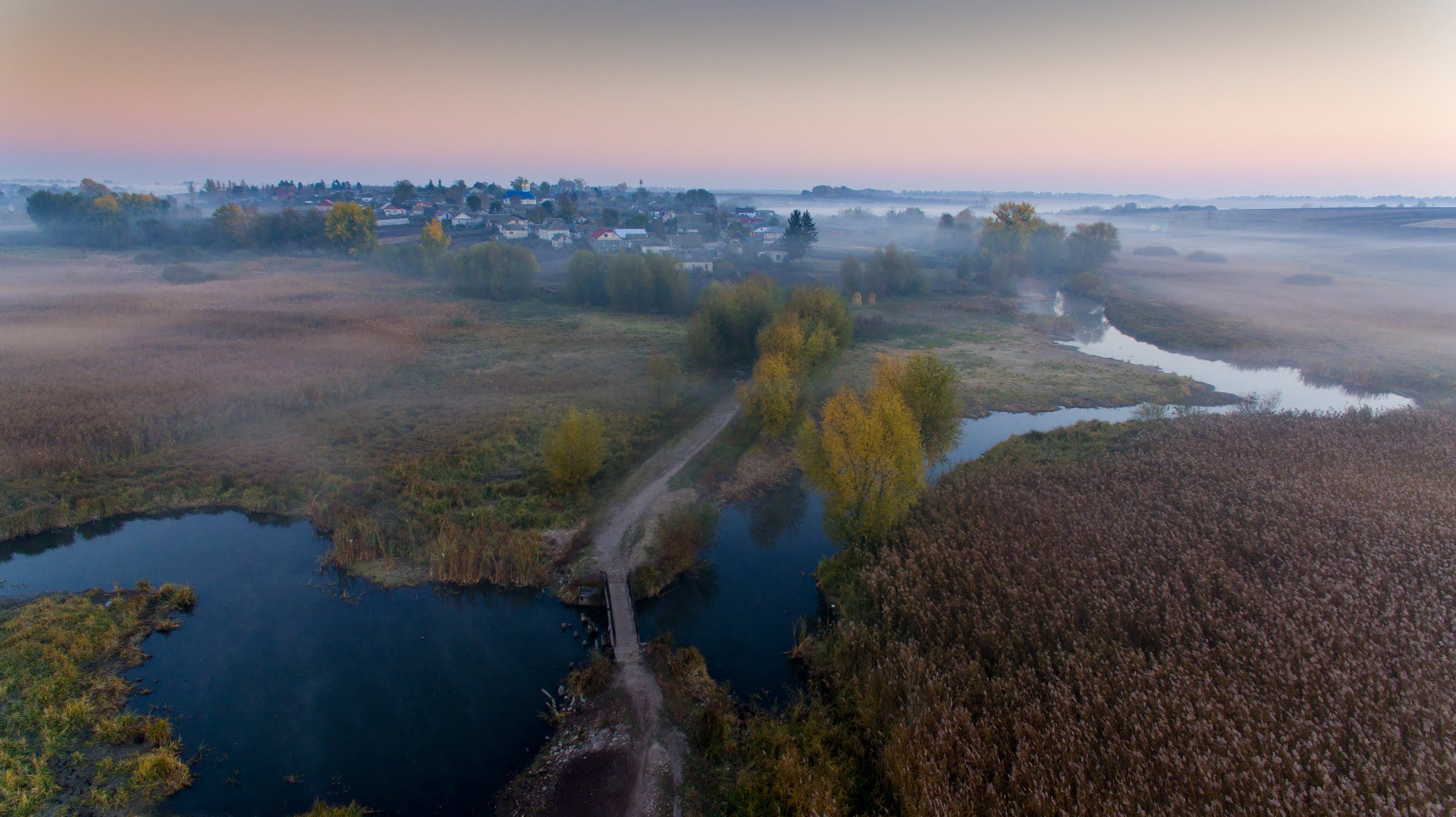 Грабарківський, Волочиський район, заплава р. Грабарка